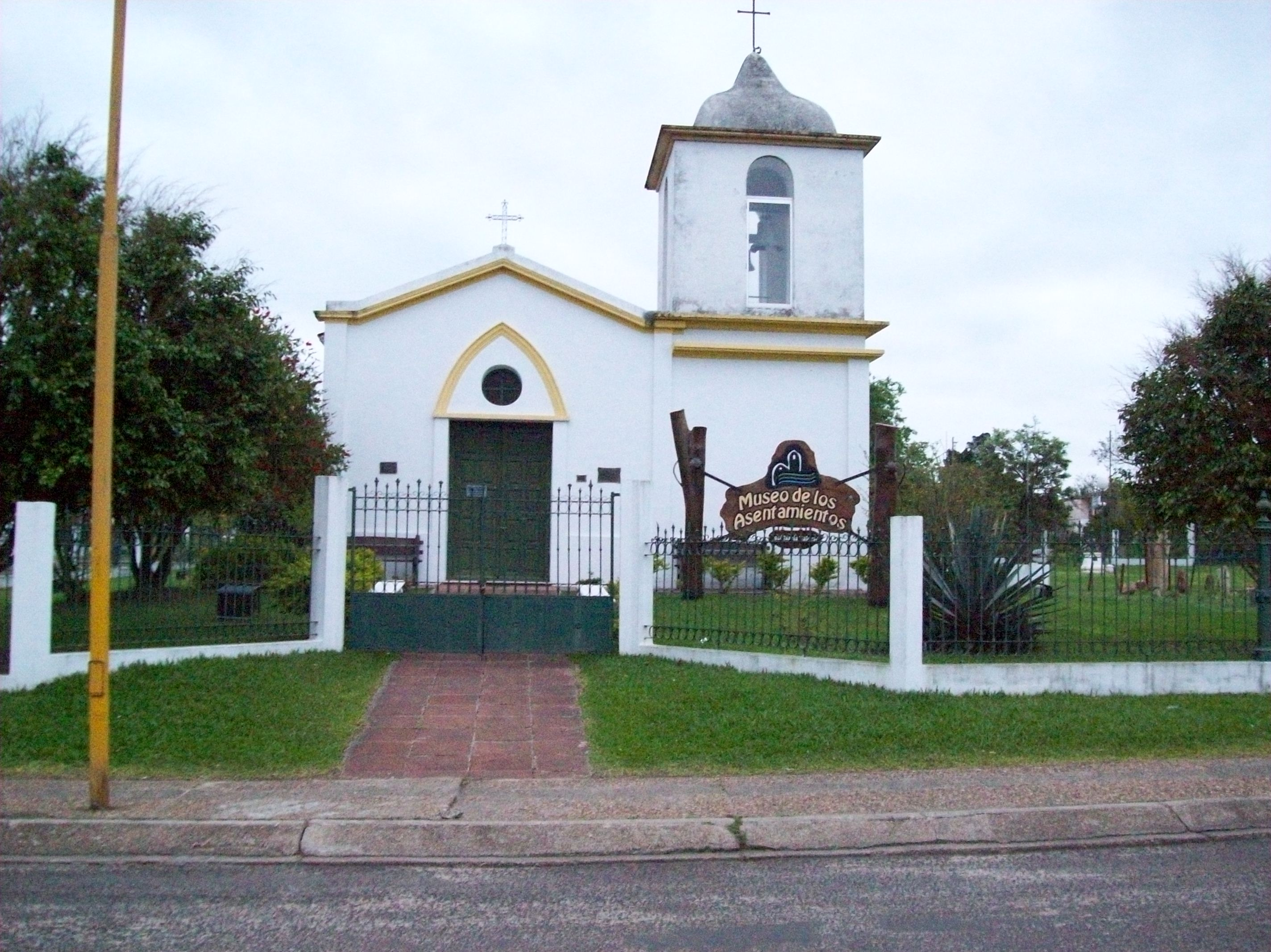 Museo de los asentamientos en Federación, Entre Ríos, Argentina. Con motivo de la inundación de Federación para construir la represa de Salto Grande, la primitiva iglesia de la vieja ciudad de Federación se desarmó y se la armó con los mismos materiales en la nueva ciudad en 1979.